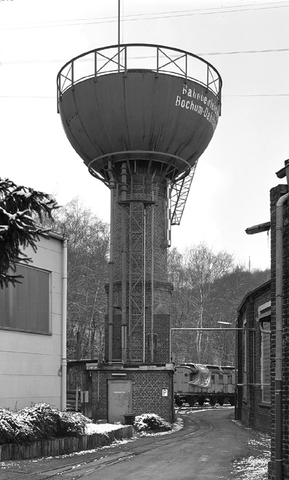 Wasserturm im ehemaligen Bahnbetriebswerk Bochum-Dahlhausen